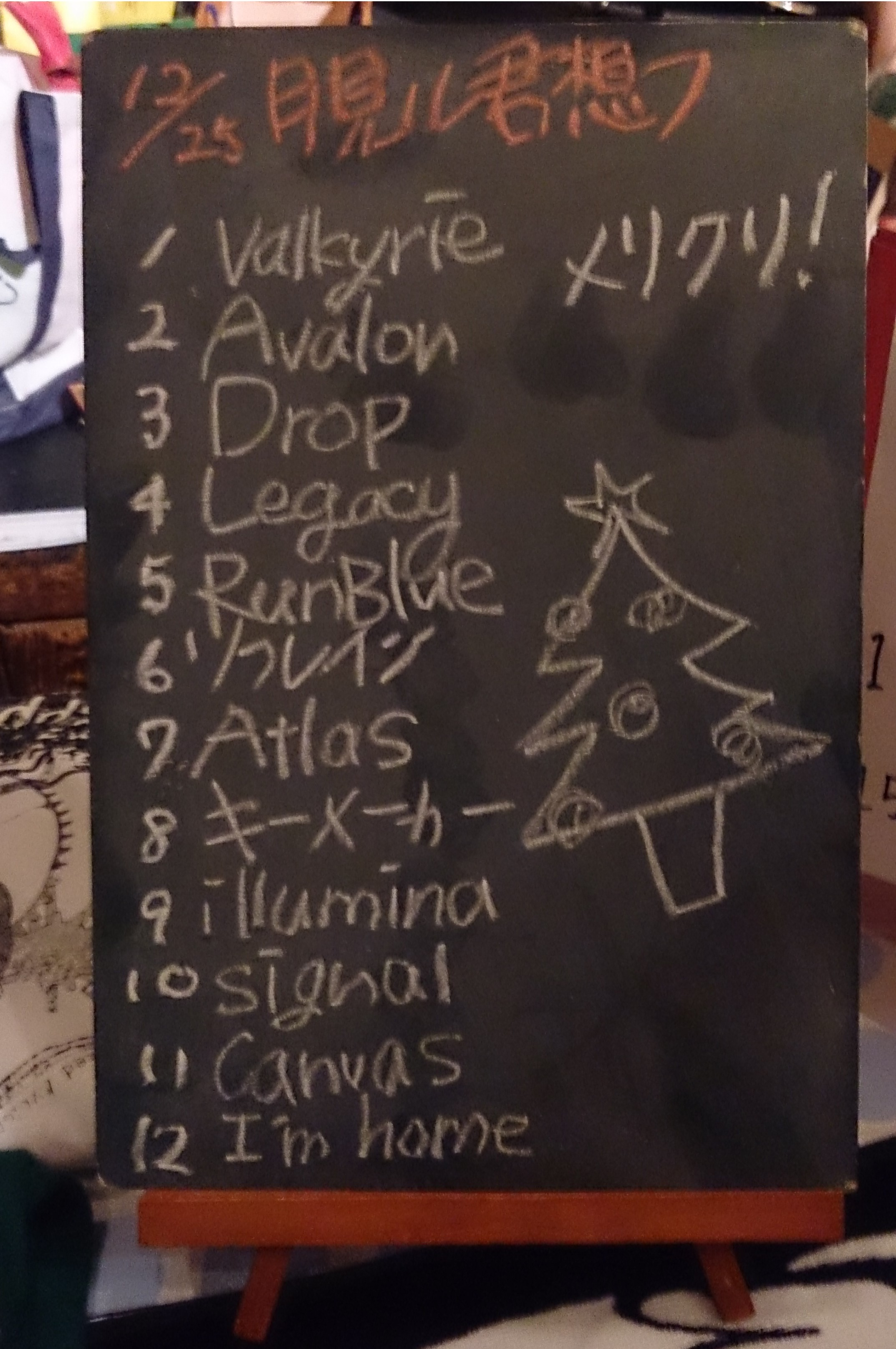 amiinAセトリボード(20171225(1-1))